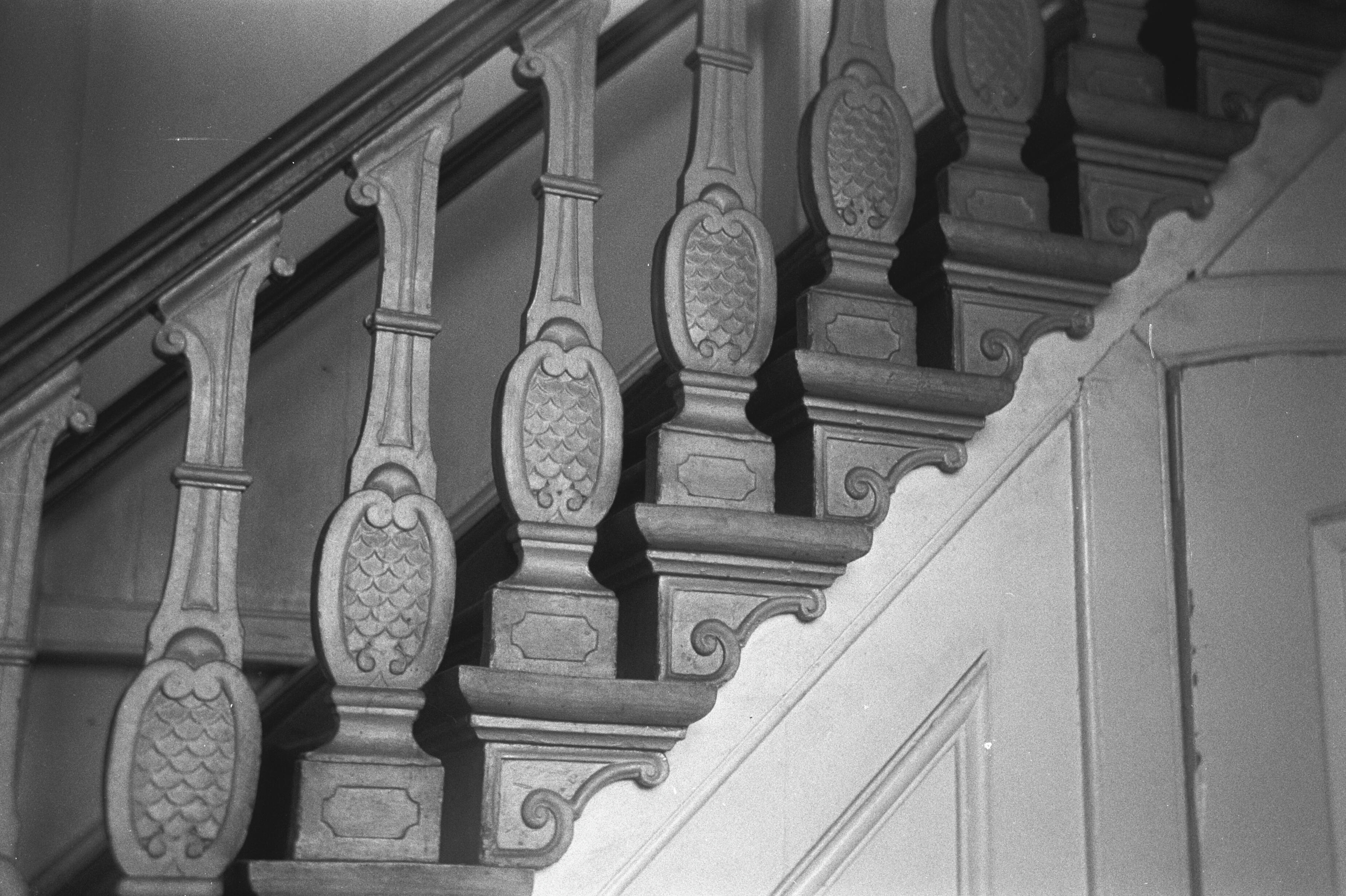 Interieur van ministerie van Binnenlandse Zaken, trapleuning met balusters Onderwerp: trappen, Trapleuning, ministerie